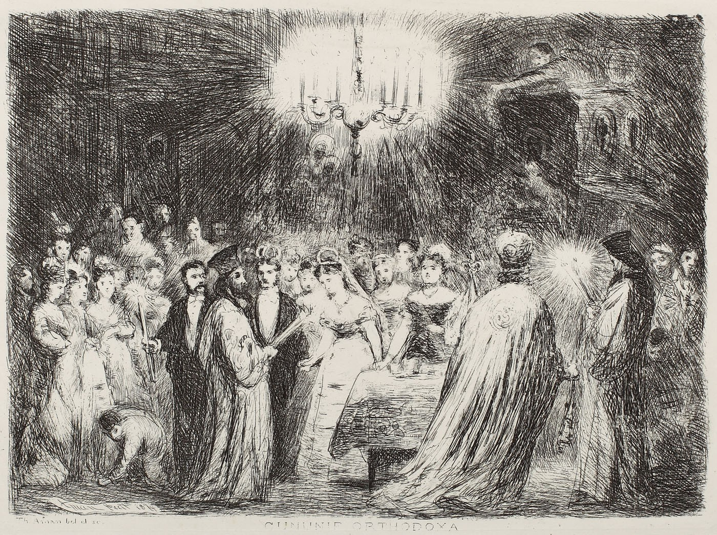 Theodor Aman (1831-1891) - Isaia dănţuieşte" (cununie ortodoxă), semnat stânga jos în lucrare, acvaforte şi ac, datat 1874, 15.5x20.5 cm. Opera este catalogată în "Repertoriul graficei românești din secolul al XIX-lea", vol.I, A-R, București, 1974, la pag. 42, cat. 171. Opera este catalogată în "Theodor Aman Gravor", Mariana Vida, București, 1993 la cat. 36, sub titlul "Cununie ortodoxă", pag. 43. )